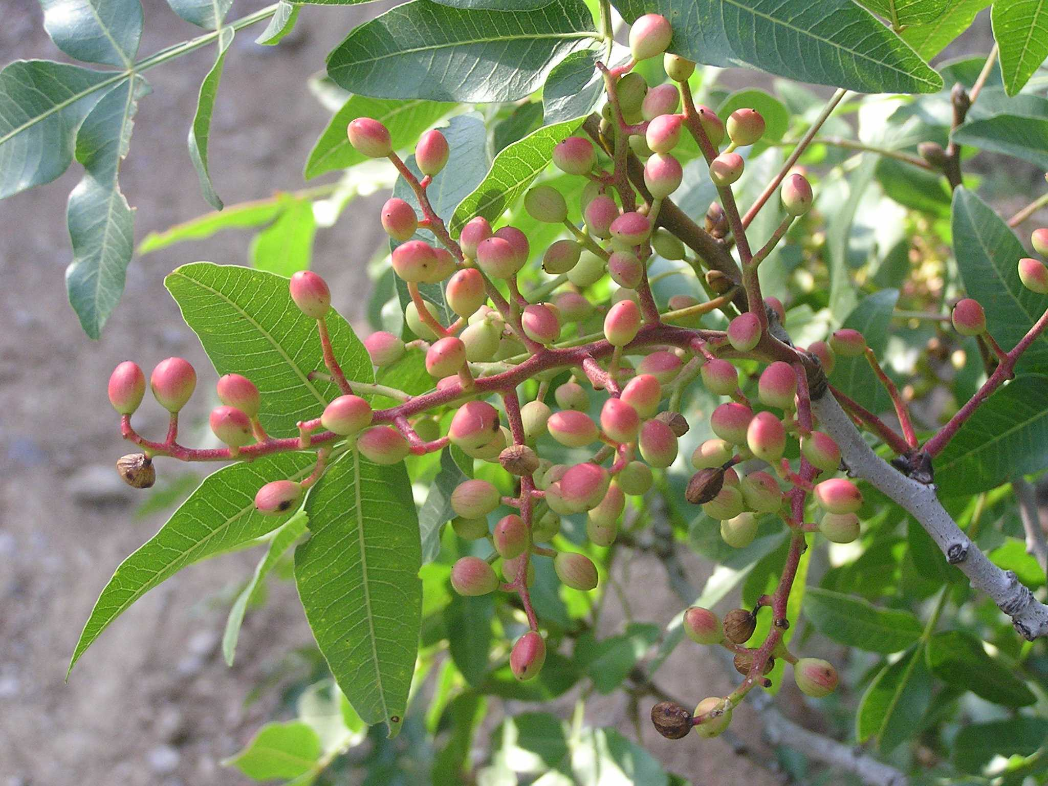 Растение. Фисташка туполистная (дикая) - Pistacia mutica (atlantica cabulica). Крым.